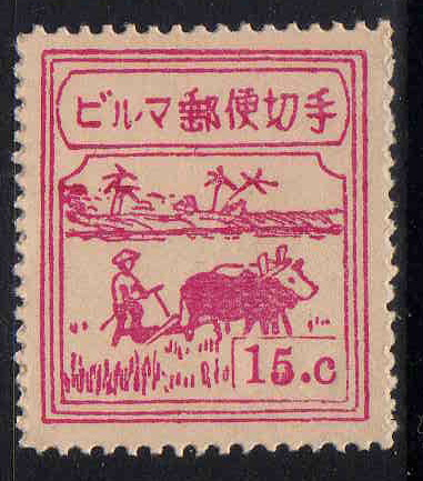 日本軍がビルマを占領した際に発行した15セント切手